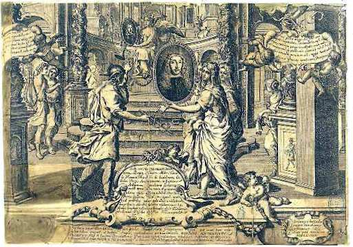 Antonio de Cardona y Borja, 1684. Inscripción en la cartela central: ILLV.º D. D. ANTONIO FOLCH DE CARDONA, Borgia, Alagon, Milan, Lansol de Romani, Marchioni de Castelnovo, Catholici Regis Archieconomo in Supremo Aragonum Conciliario consecraverat aram Dea vocis et præconii festivus adytis offerre subibat charitum chorus cyllenius adest... Biblioteca Nacional de España